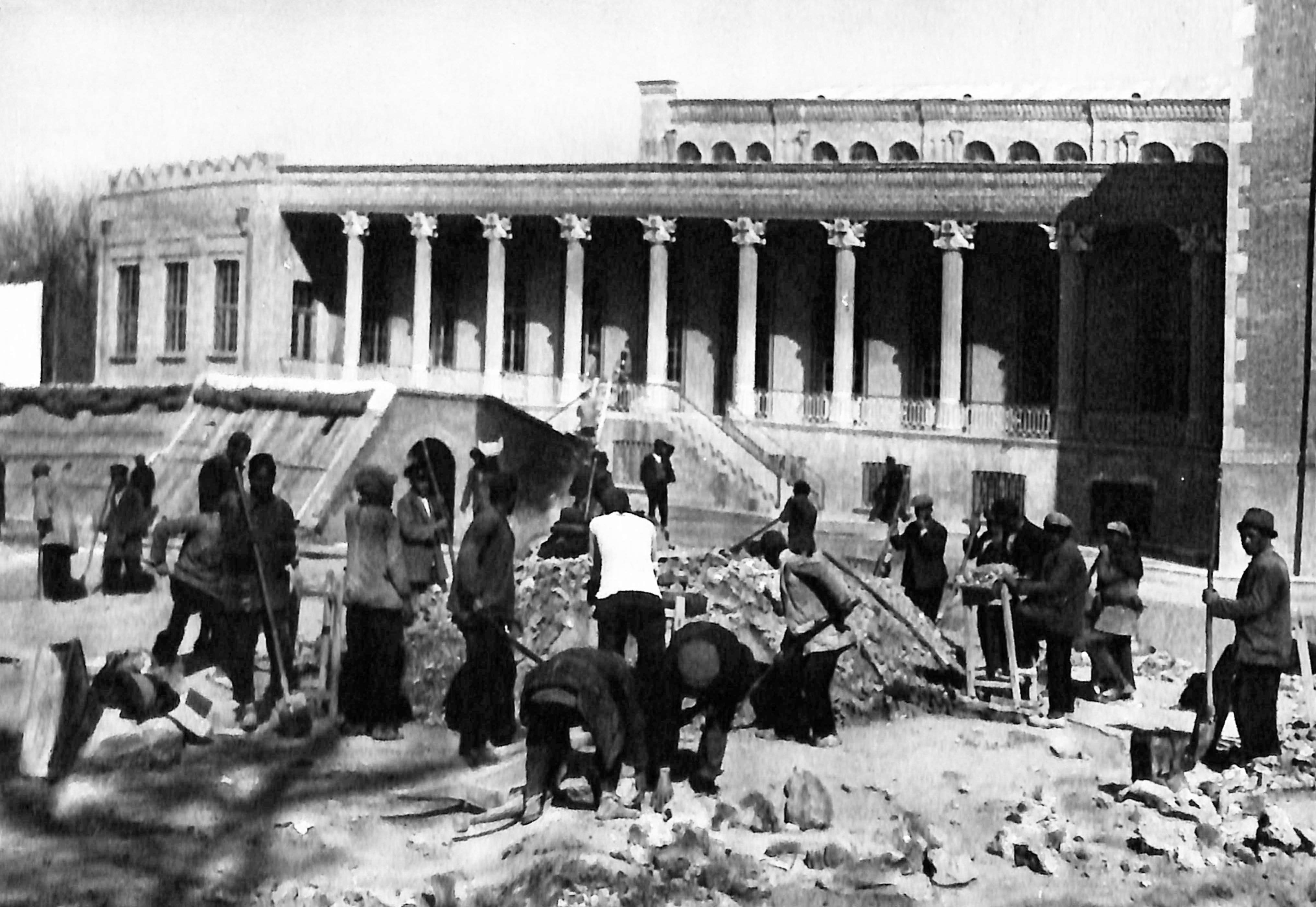 تصویری از بانك ملی و كارگران در زمان ساخت و ساز آن